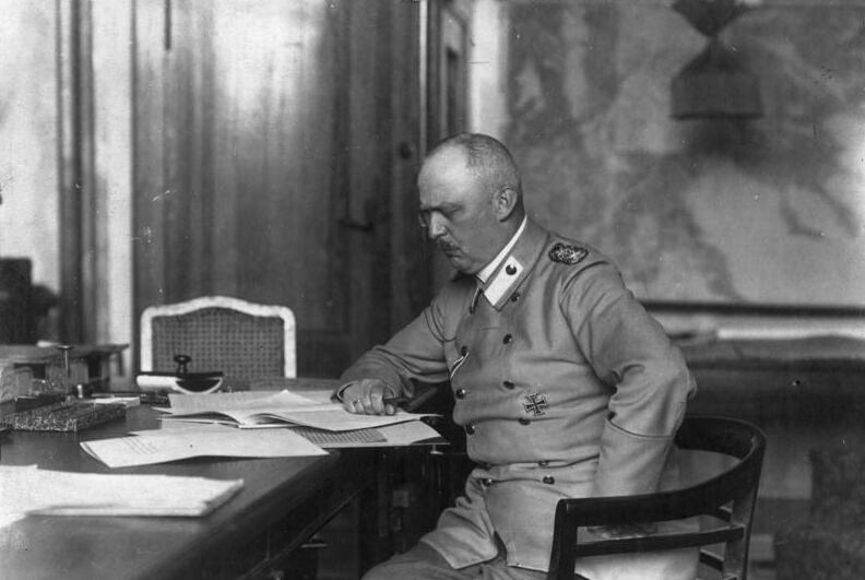 Erich Ludendorff Generalquartiermeister Ludendorff in seinem Arbeitszimmer im Großen Hauptquartier [Erich Ludendorff am Schreibtisch sitzend] Abgebildete Personen: Ludendorff, Erich: 1865-1937, General, kaiserliches Heer, MdR, NSDAP, Tannenbergbund, Deutschland (GND 118574841)